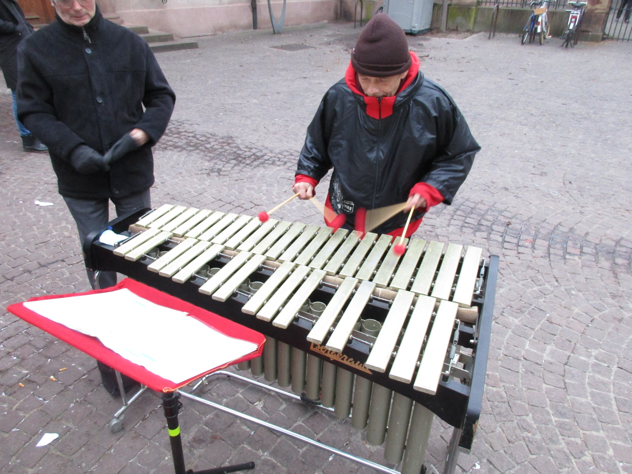 Marché de Noël de Colmar